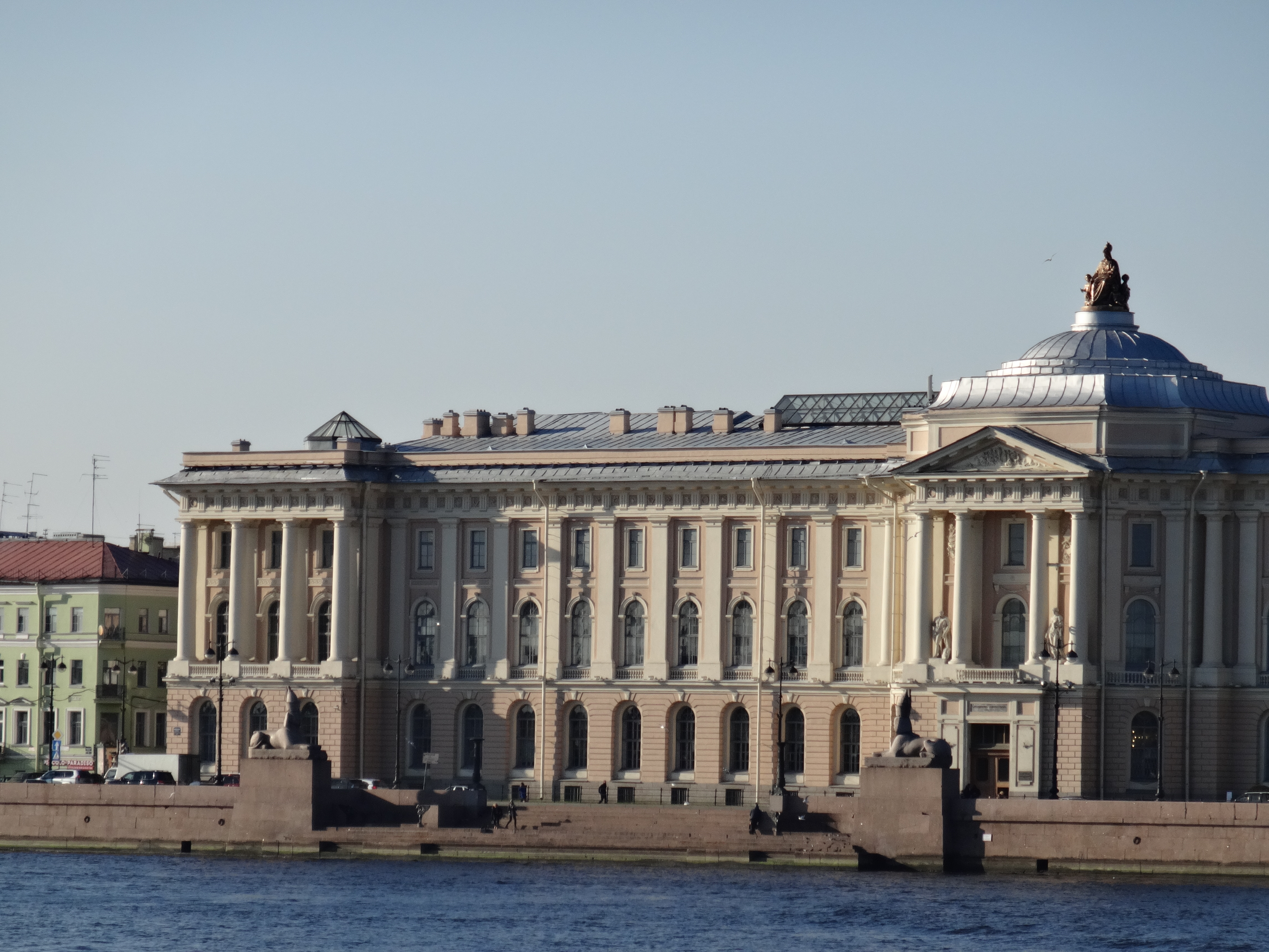 Пристань со сфинксами фараона Аменхотепа III (Санкт-Петербург и Лен.область, Санкт-Петербург, Университетская наб. - правый берег р. Большой Невы от Дворцового моста до моста Лейтенанта Шмидта)